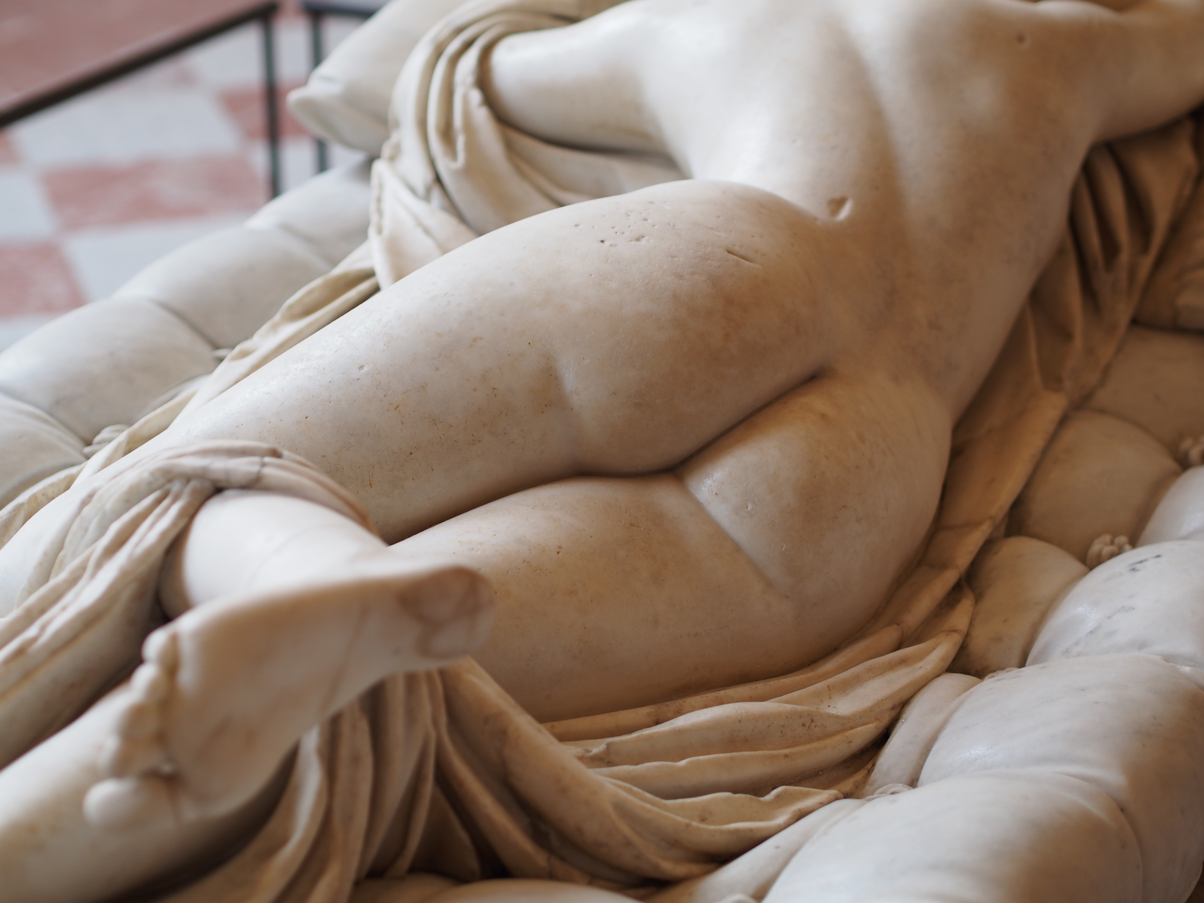 Hermaphrodite endormi — Copie romaine du IIe siècle ap. J.-C. d'un marbre grec des années 150 av. J.-C. - découverte à Rome, près des thermes de Dioclétien. Le matelas, également en marbre, est l'œuvre du Bernin et date de 1619. L'ensemble est conservé au musée du Louvre (Achat, 1807, collection Borghèse. N° d'inv. MR 220 - n° usuel Ma 231.) Photo prise lors de la sortie Wikipedia takes the Louvre du 14 juillet 2013.